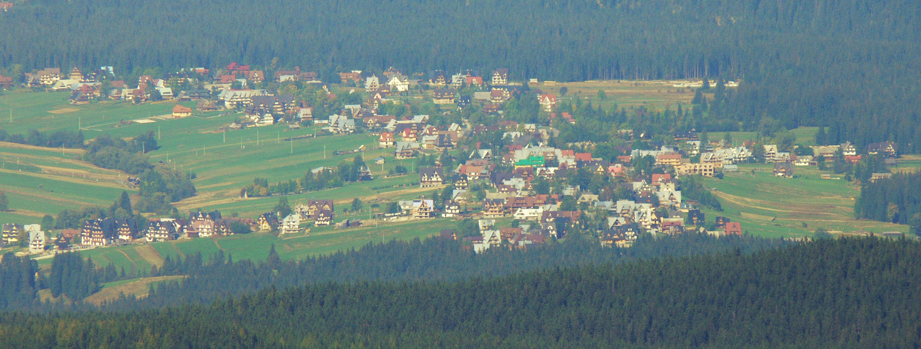 Murzasichle widziane z Kościelca